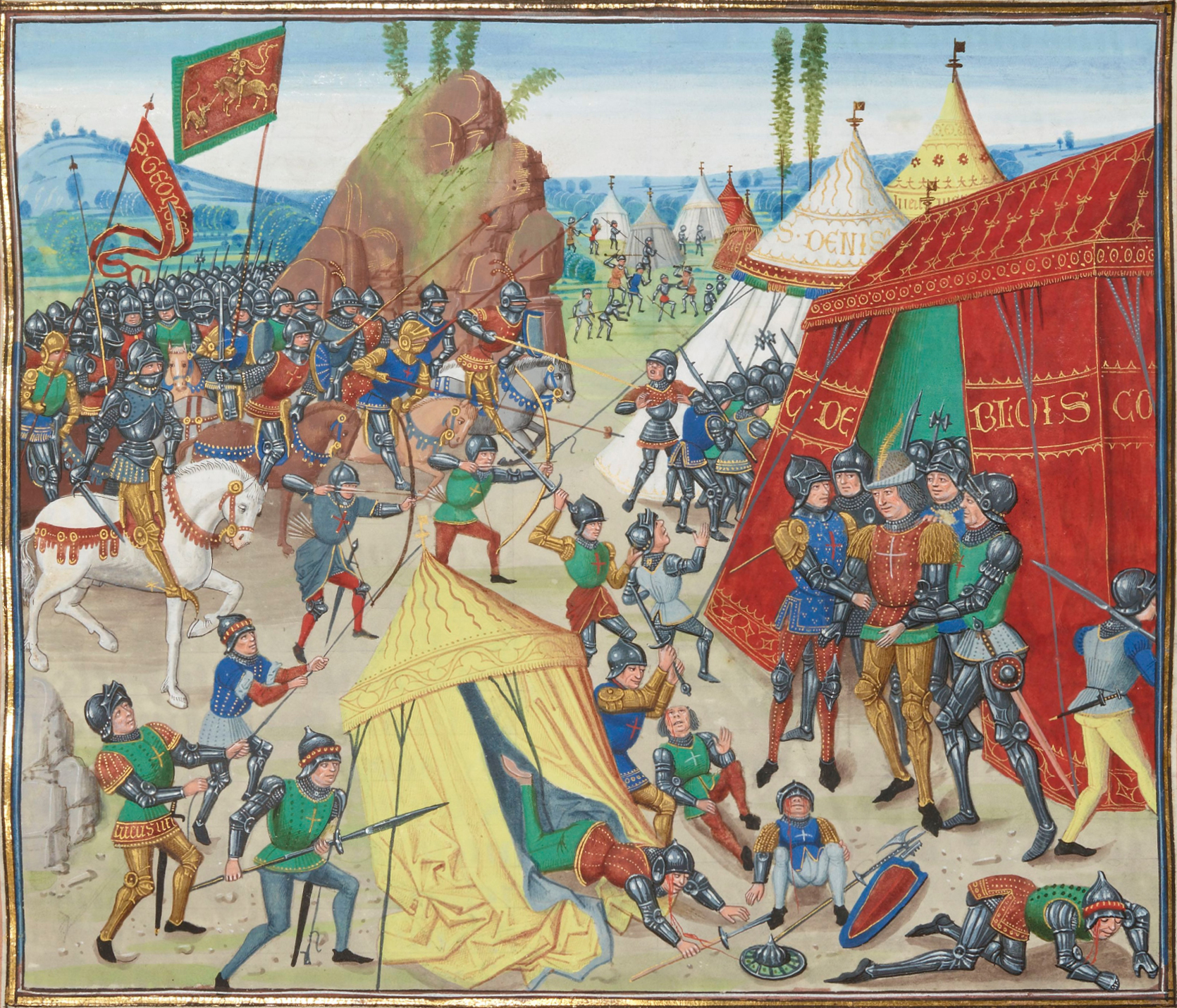 Capture Charles de Blois en 1347, Bataille de Vannes, La Roche-Derrien.